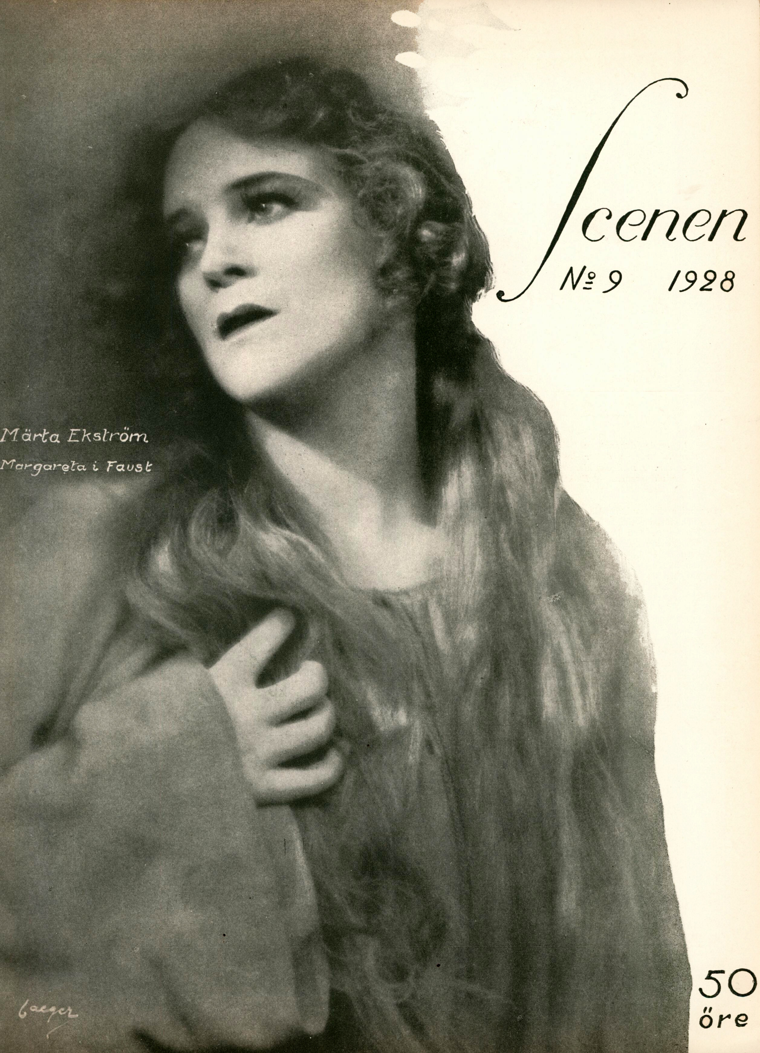 Märta Ekström (1899-1952) som Margareta i Faust. Foto på omslaget till Scenen 1928.